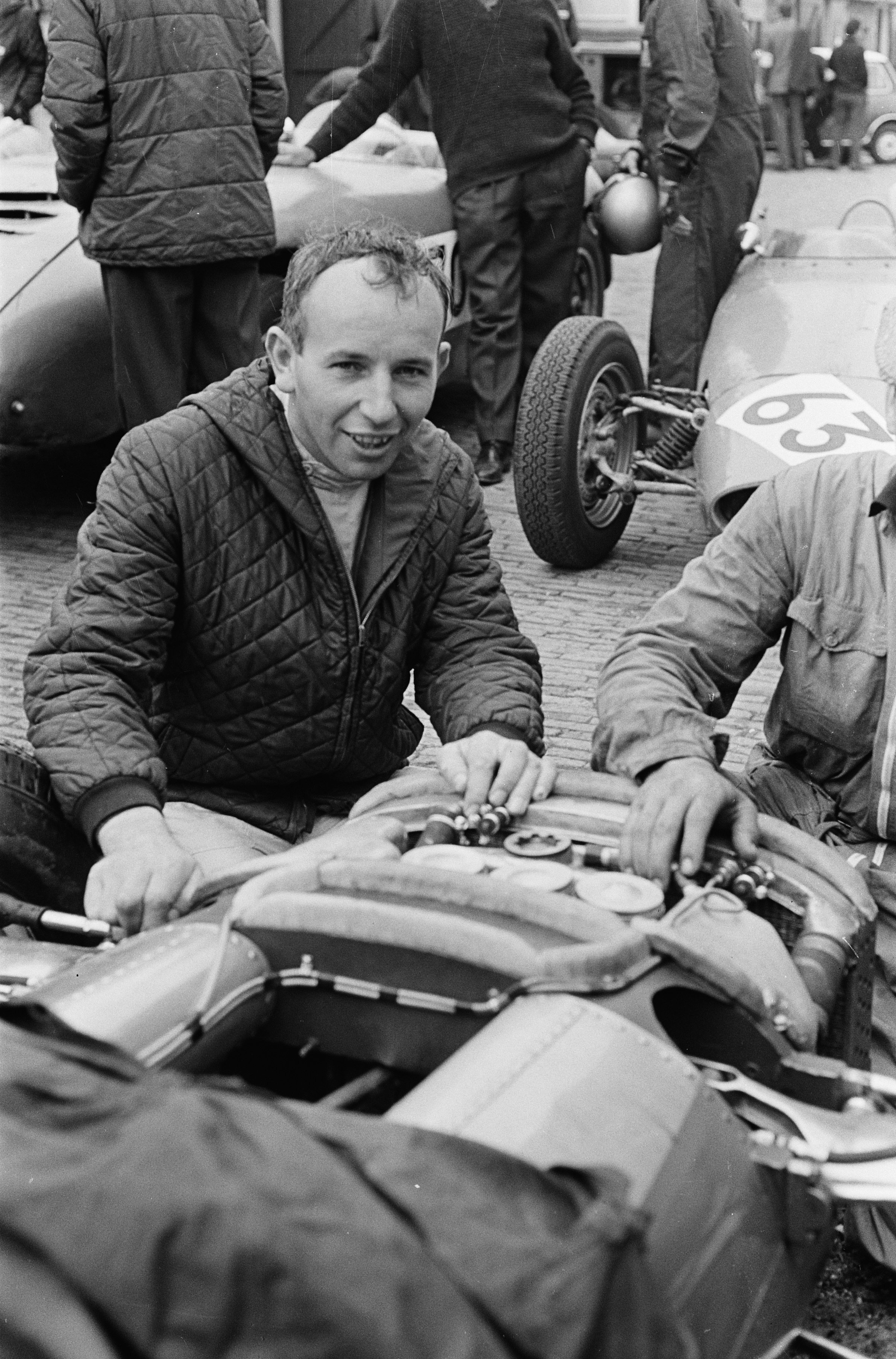 Collectie / Archief : Fotocollectie Anefo Reportage / Serie : [ onbekend ] Beschrijving : Training Grand Prix te Zandvoort, John Surtees bij zijn nieuwe wagen Datum : 22 mei 1964 Locatie : Noord-Holland, Zandvoort Trefwoorden : wagens Persoonsnaam : surtees Fotograaf : Pot, Harry / Anefo Auteursrechthebbende : Nationaal Archief Materiaalsoort : Negatief (zwart/wit) Nummer archiefinventaris : bekijk toegang 2.24.01.05 Bestanddeelnummer : 916-4625